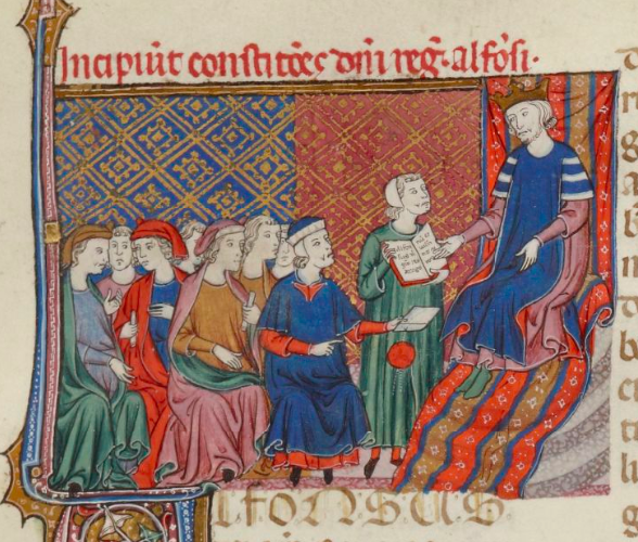 Alphonse 3 confirmant la constitution